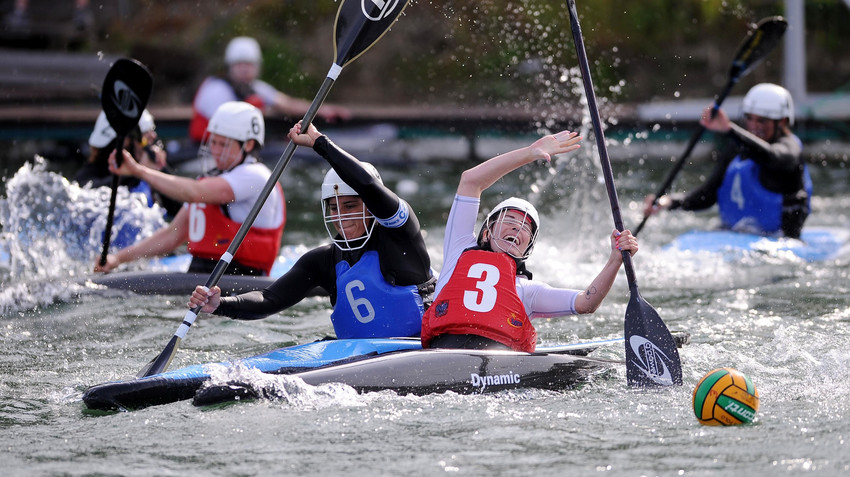 Polo kajak